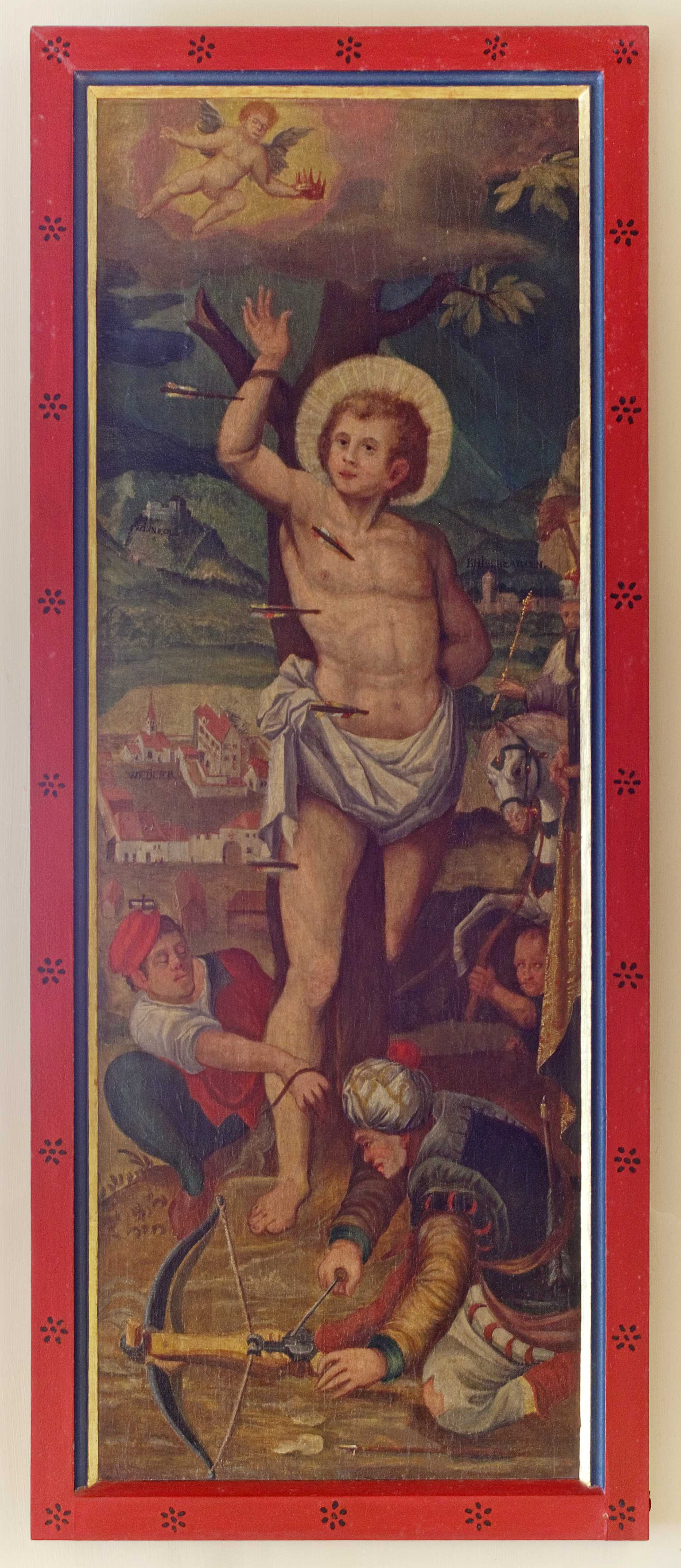 Schlosskapelle Stegen-Weiler Die Sebastianstafel an der Nordseite der Kapelle